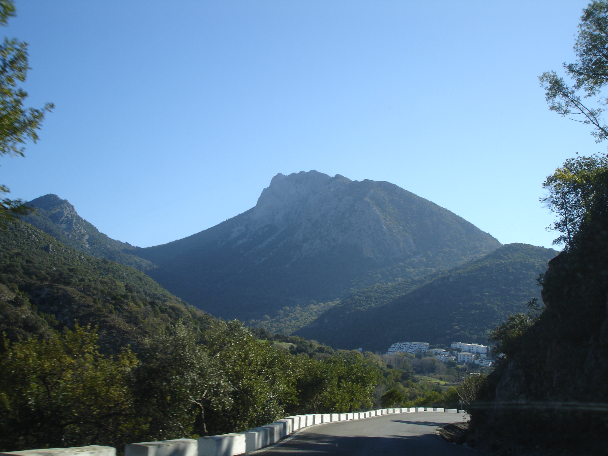 Vista de Benamahoma al llegar por la carretera de El Bosque